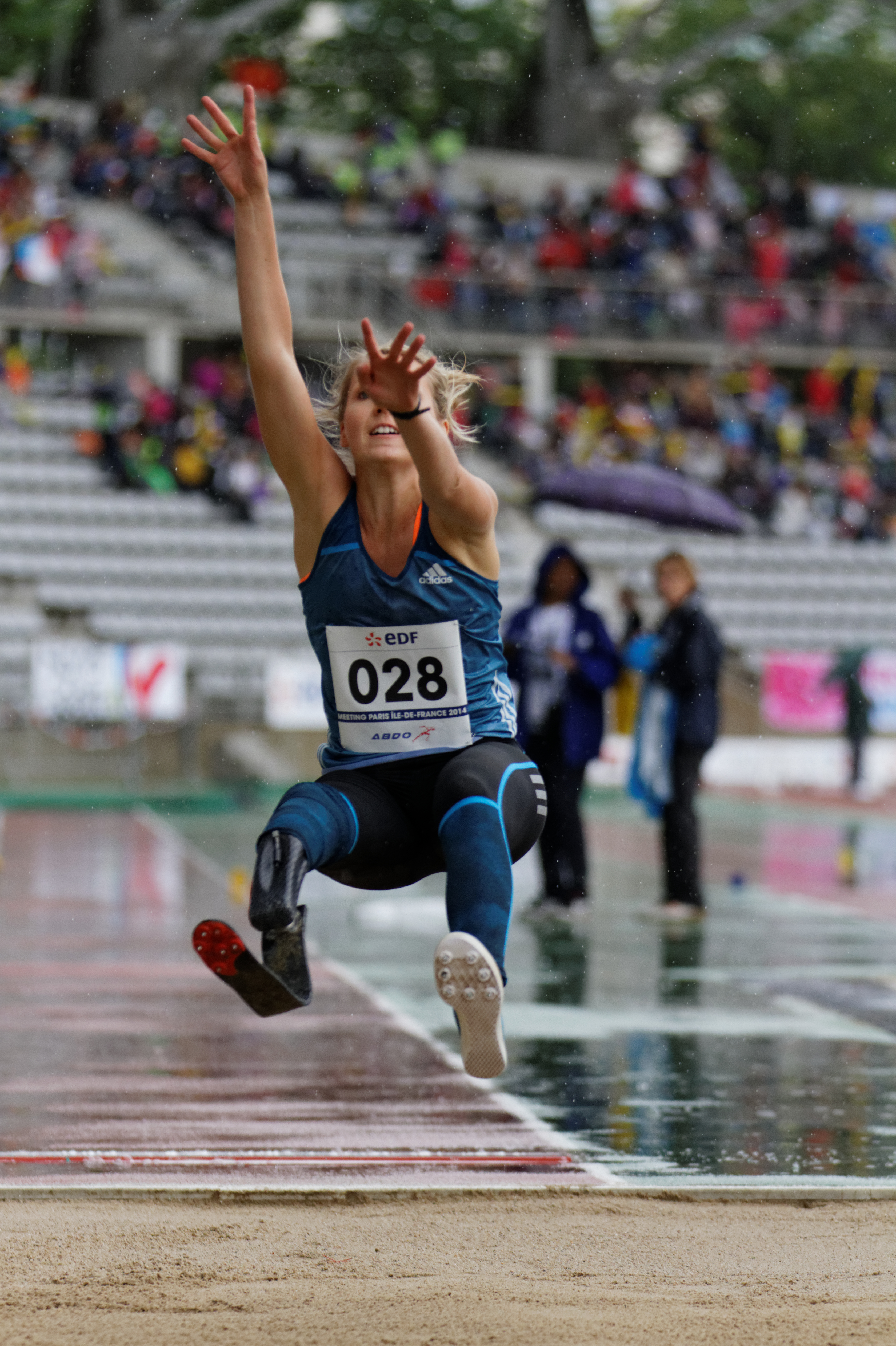 Iris Pruysen, saut en longueur, Meeting d'Athlétisme Paralympique de Paris, 4 juin 2014.